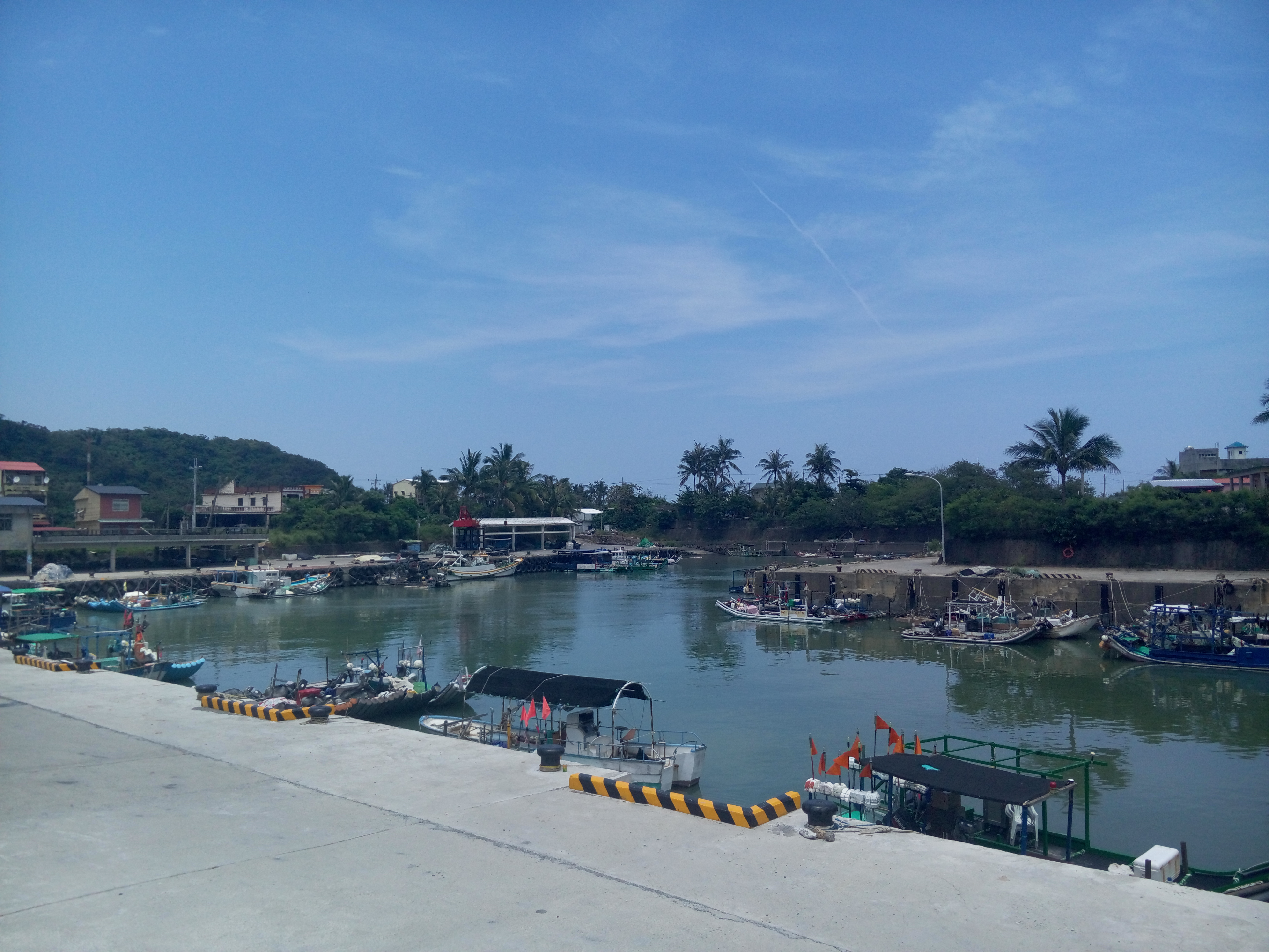 臺灣臺東縣大武鄉尚武漁港內港